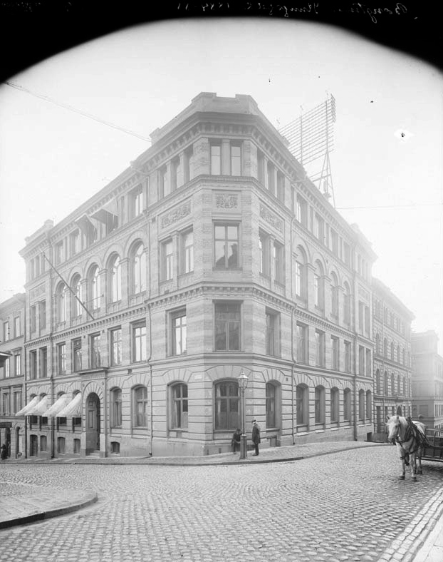 Ateneum för flickor, läroverk i hörnet av Kungsgatan 2 och Stora Badstugatan 5. Hästhuvudet 15 Byggnadsår 1884. Arkitekt Fritz Eckert